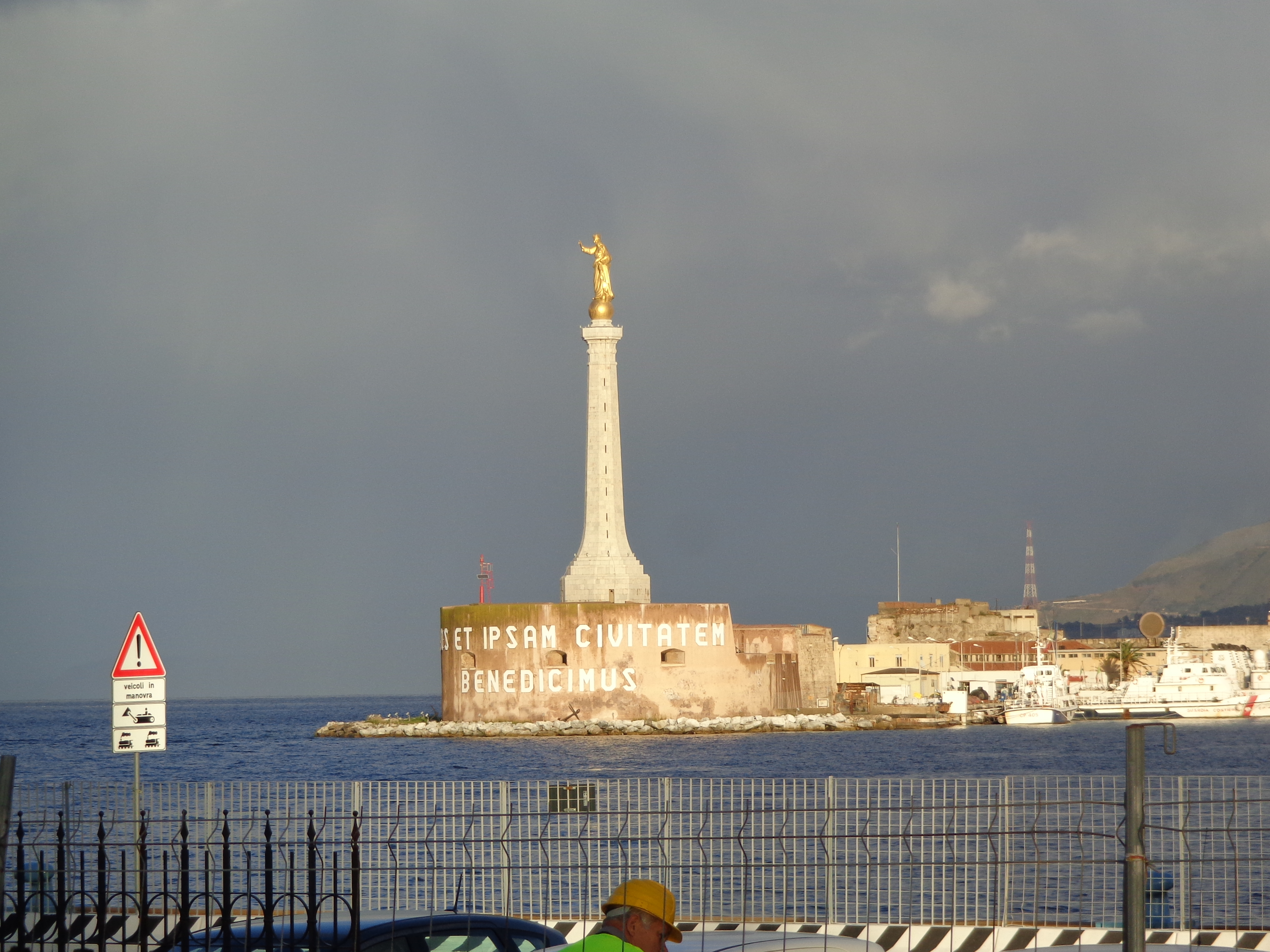 Madonna della Lettera (Messina)